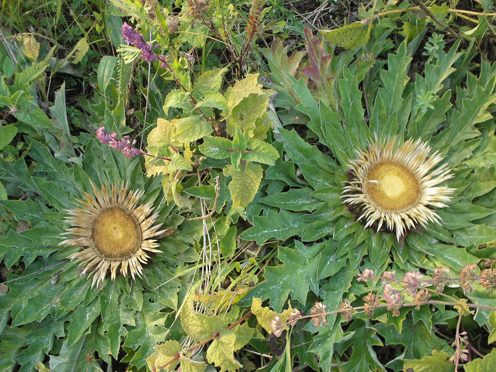 «Кармелюкове Поділля», Чечельницький район Бондурівська, Бритавська, Вербська, Демівська, Куренівська, Любомирська, Лузька, Стратіївська, Тартацька, Червоногреблянська сільські ради Чечельницької селищної ради Чечельницького району Тростянецький район с. Торканівка